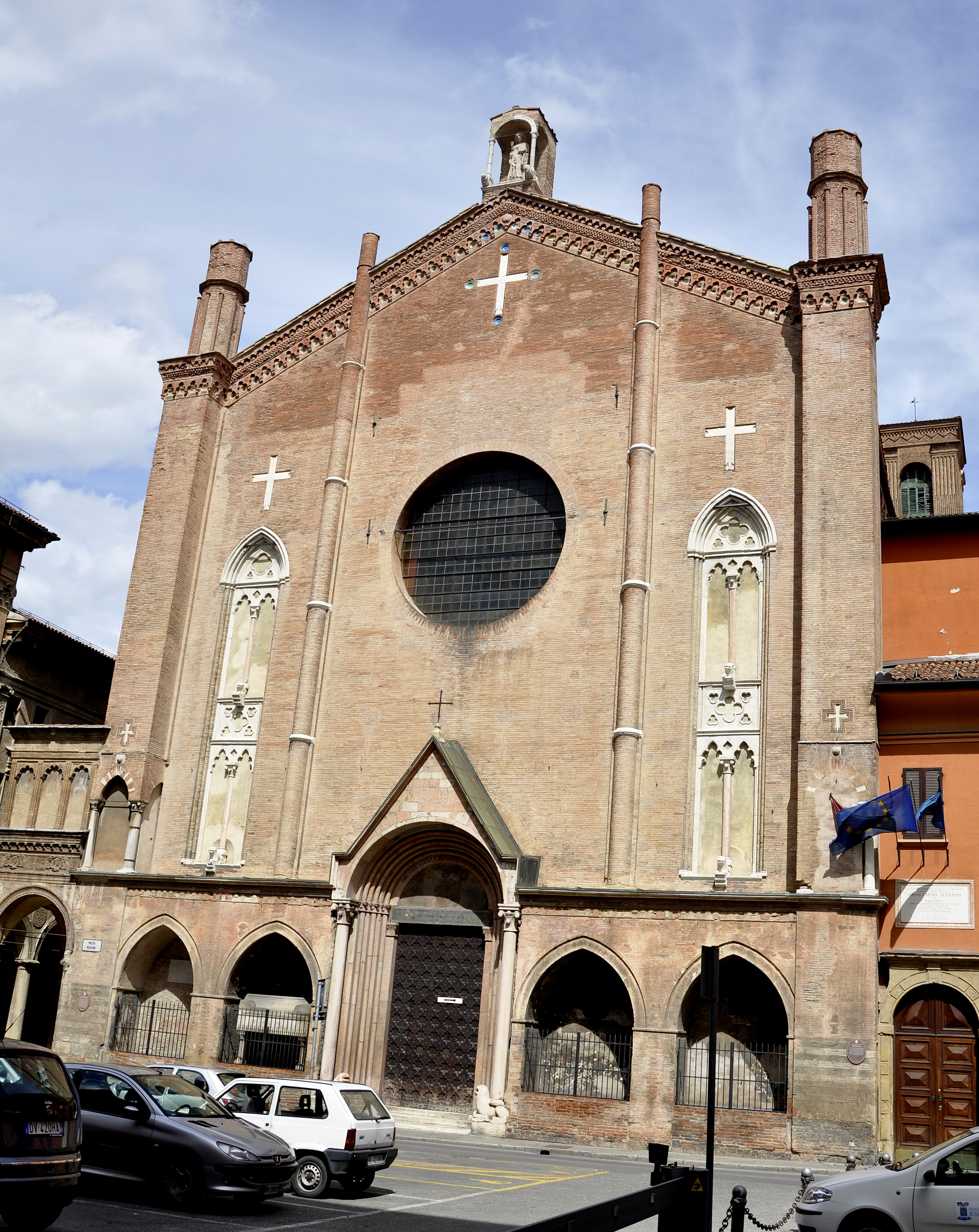 Basiliek van Sint-Jakobus de Meerdere (San Giacomo Maggiore) te Bologna